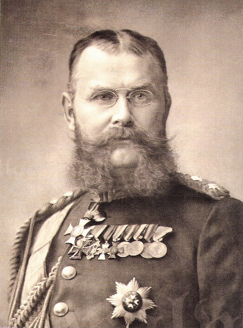 König Wilhelm II. von Württemberg (offizielles Porträt)